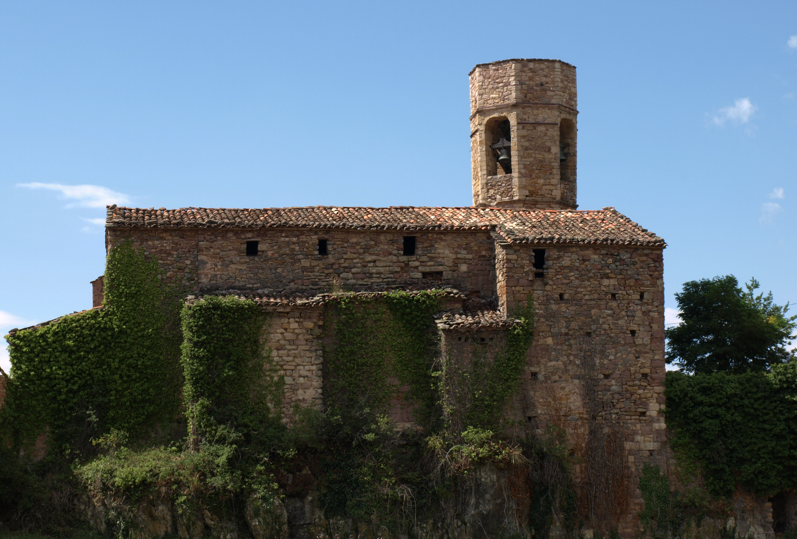 Església parroquial de Sant Cristòfol (Baix Pallars)